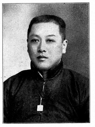 中文（台灣）: 中華民國國會議員